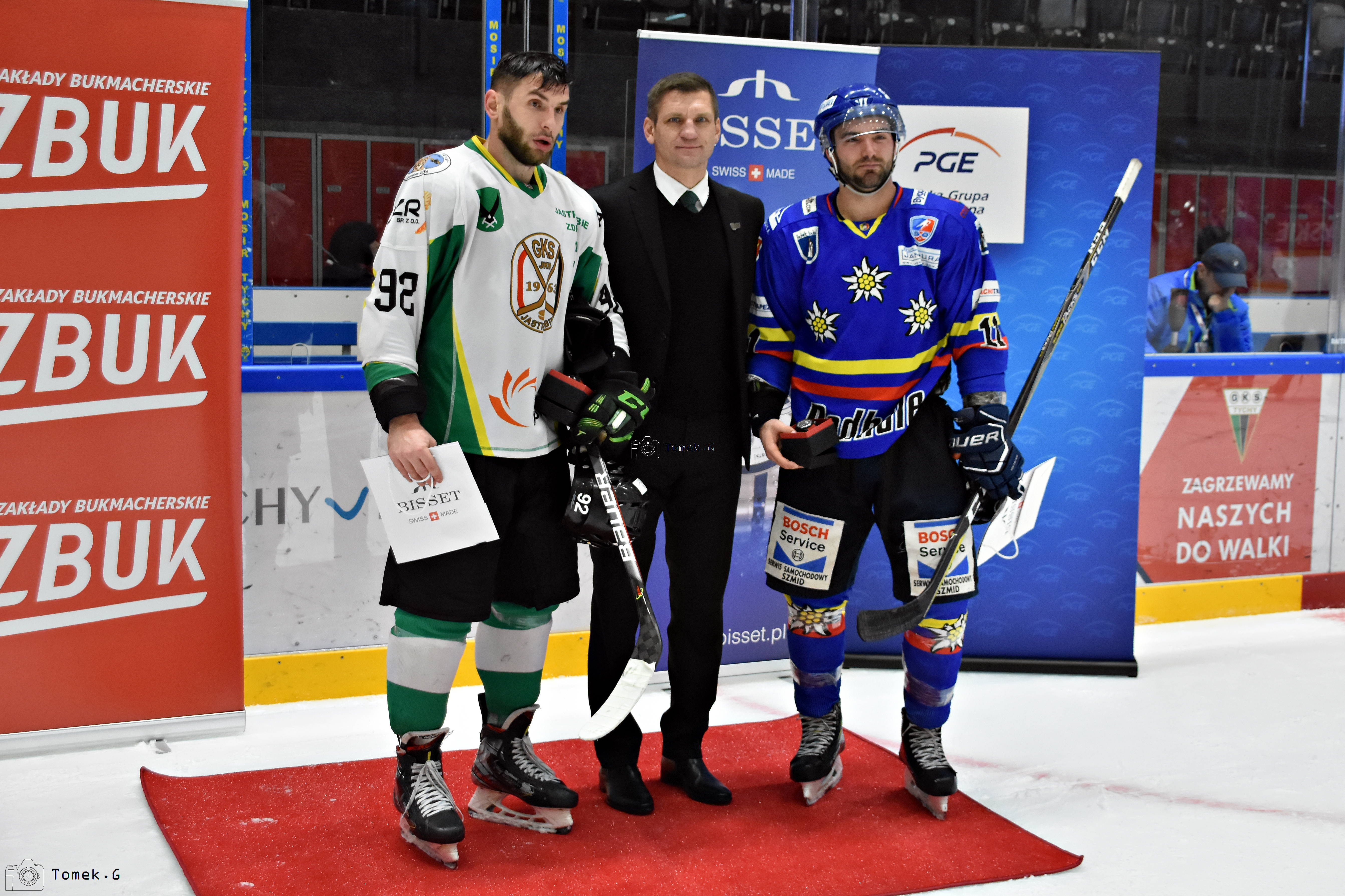 Puchar Polski w Hokeju na Lodzie 2019/2020